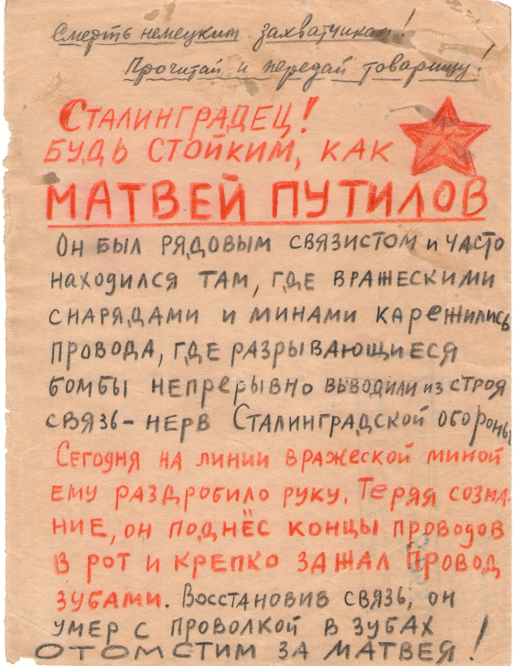 Листовка выпущенная осенью 1942 года политотделом 308-й стрелковой дивизии. В листовке описывается подвиг сержанта-связиста Матвея Путилова, погибшего при выполнении приказа.